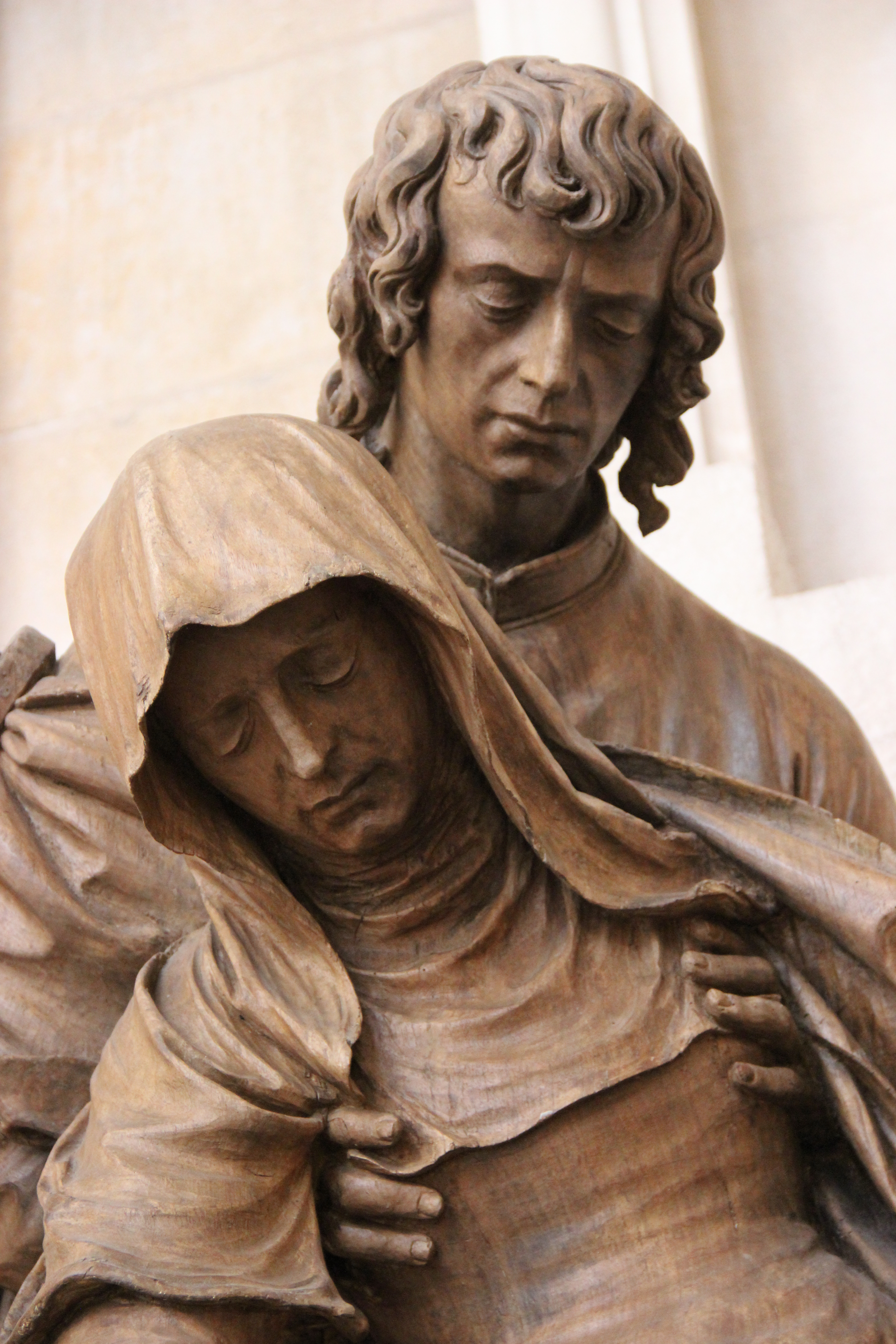 Pamoison de la Vierge à Saint-Mihiel